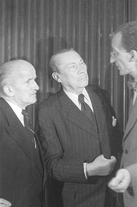 Original image description from the Deutsche Fotothek Porträt